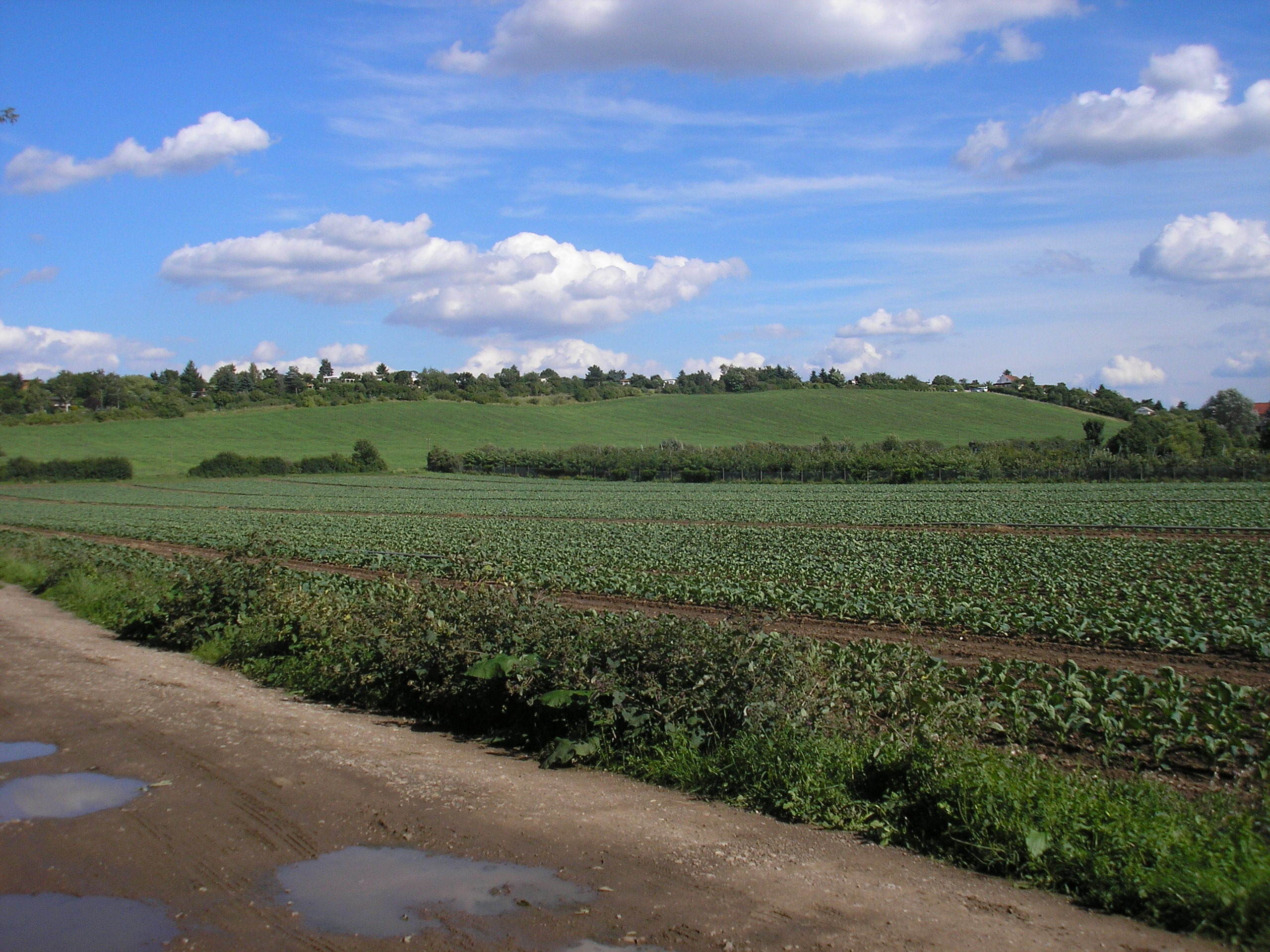 Der Galgenberg im Osten von Erfurt.